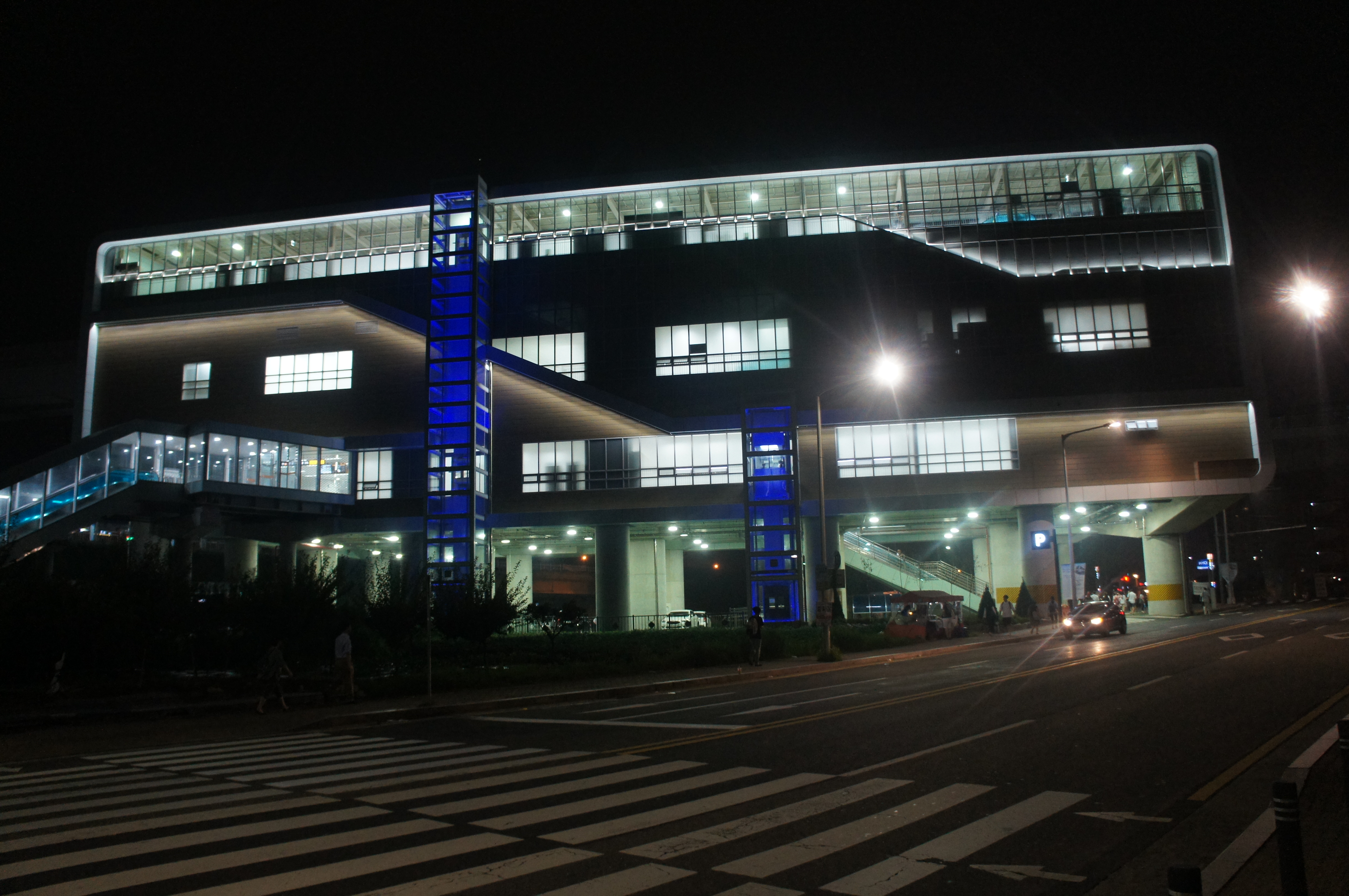 인천2호선 검암역 역사 (야경)